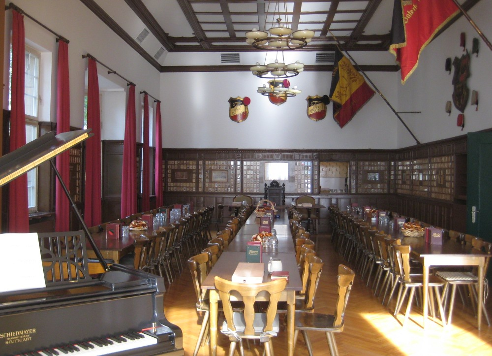 Kneipsaal der Burschenschaft Alemannia Stuttgart zum 142. Stiftungsfest 2008